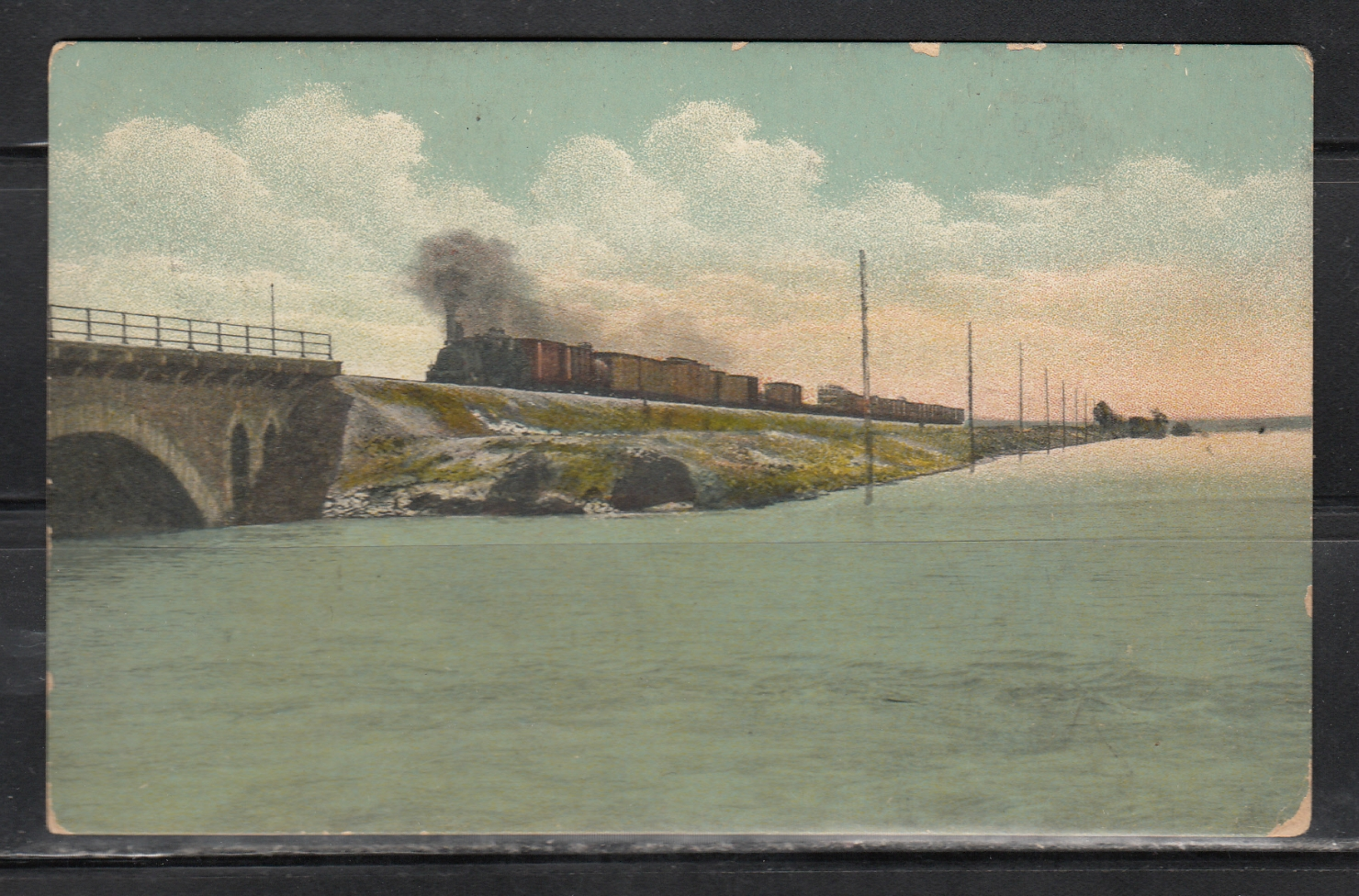 Поезд на подъезде к городу Ростов-на-Дону со стороны села Батайского (ныне г. Батайск) во время разлива реки Дон. Владикавказская железная дорога.